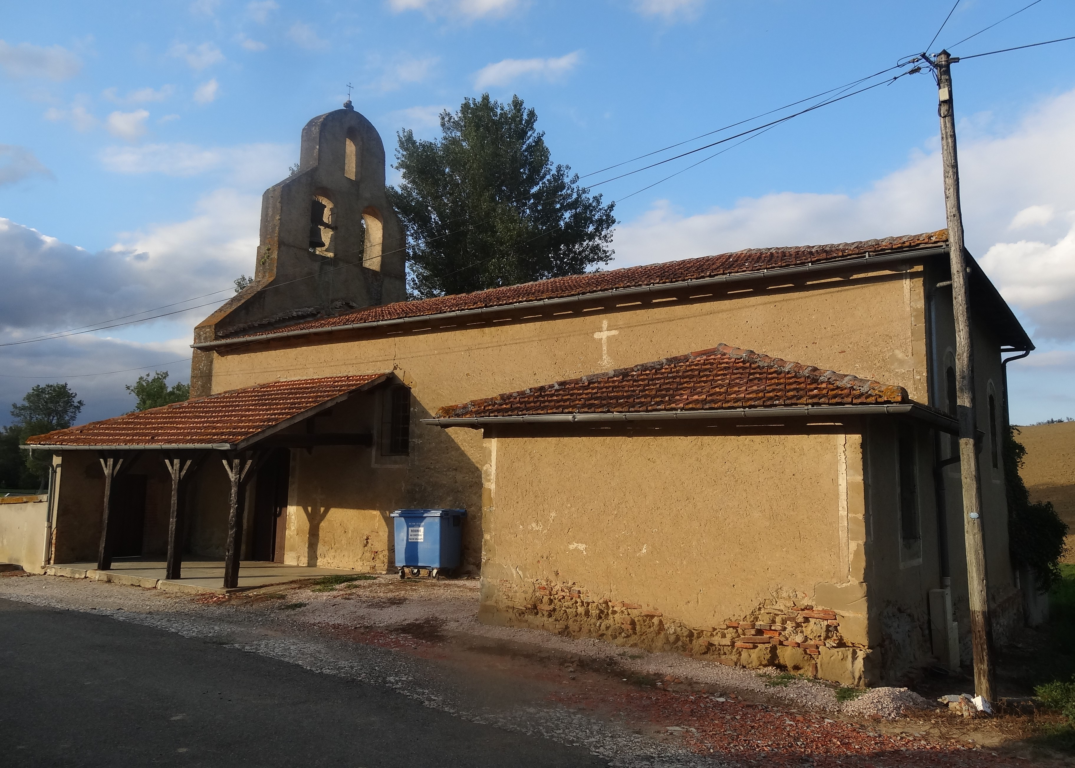 L'église de Tirent.